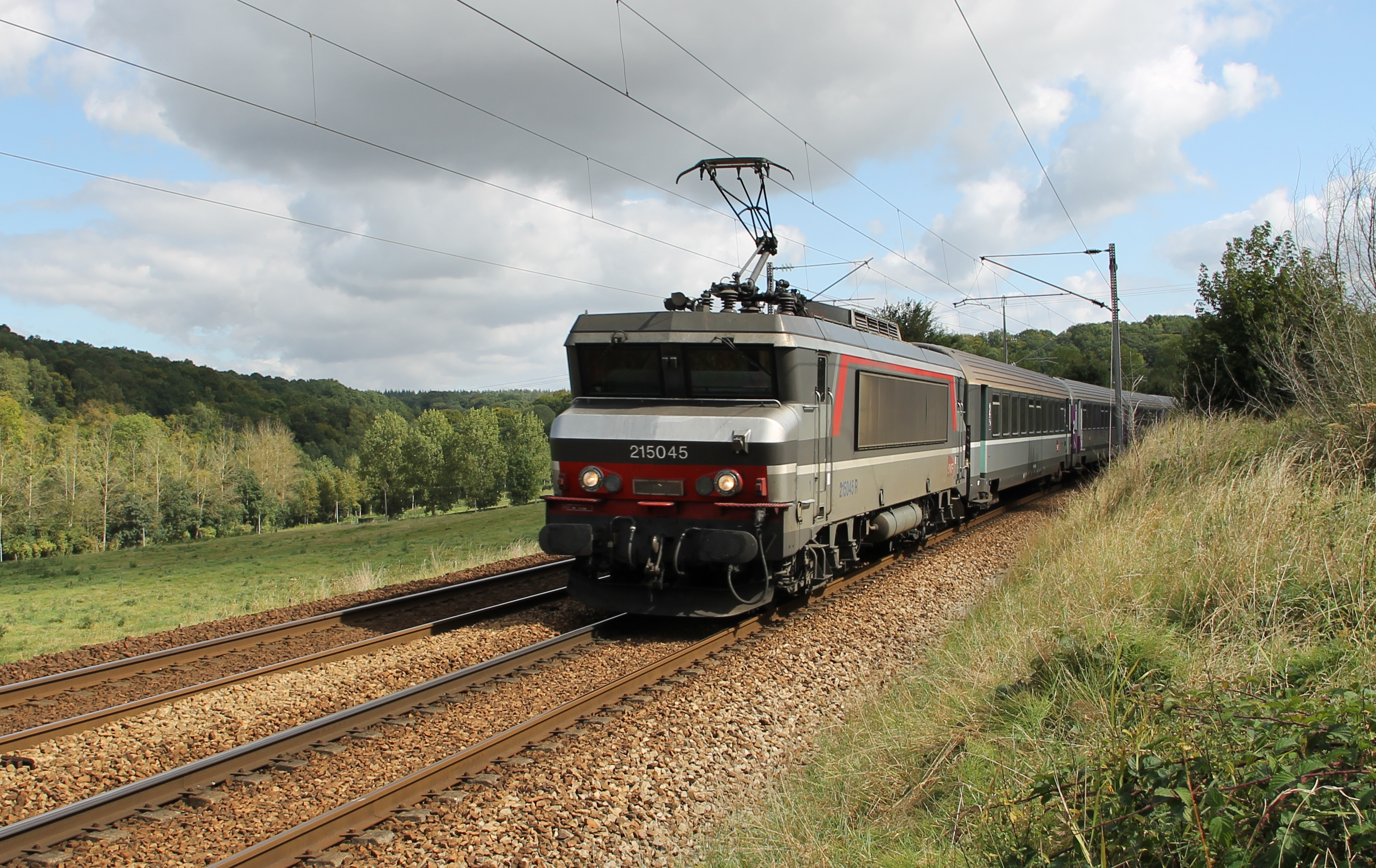 La BB 215045 en tête d'un Corail Paris-Le Havre près de Barentin